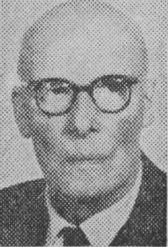 Gerdt Stendahl